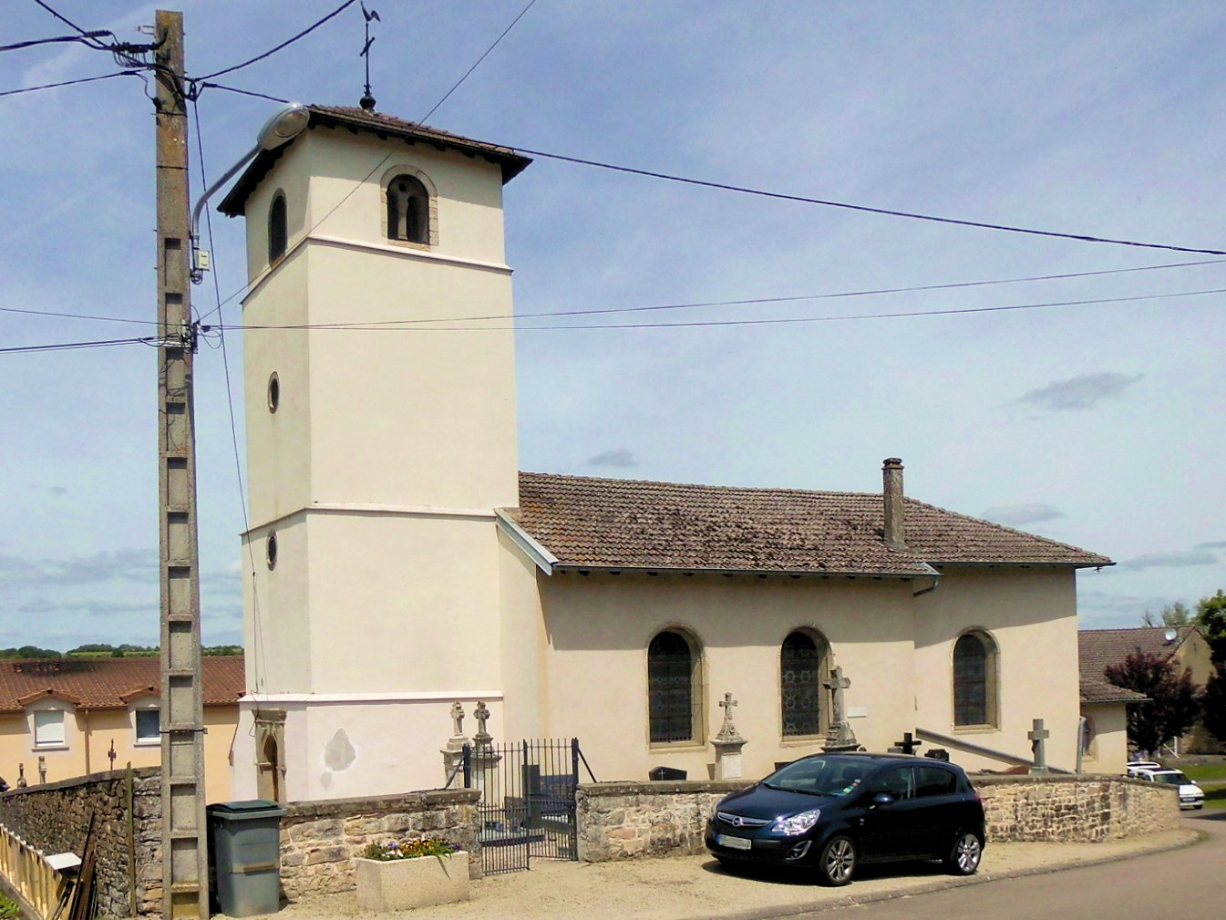 L'église Saint-Lambert à Thiraucourt